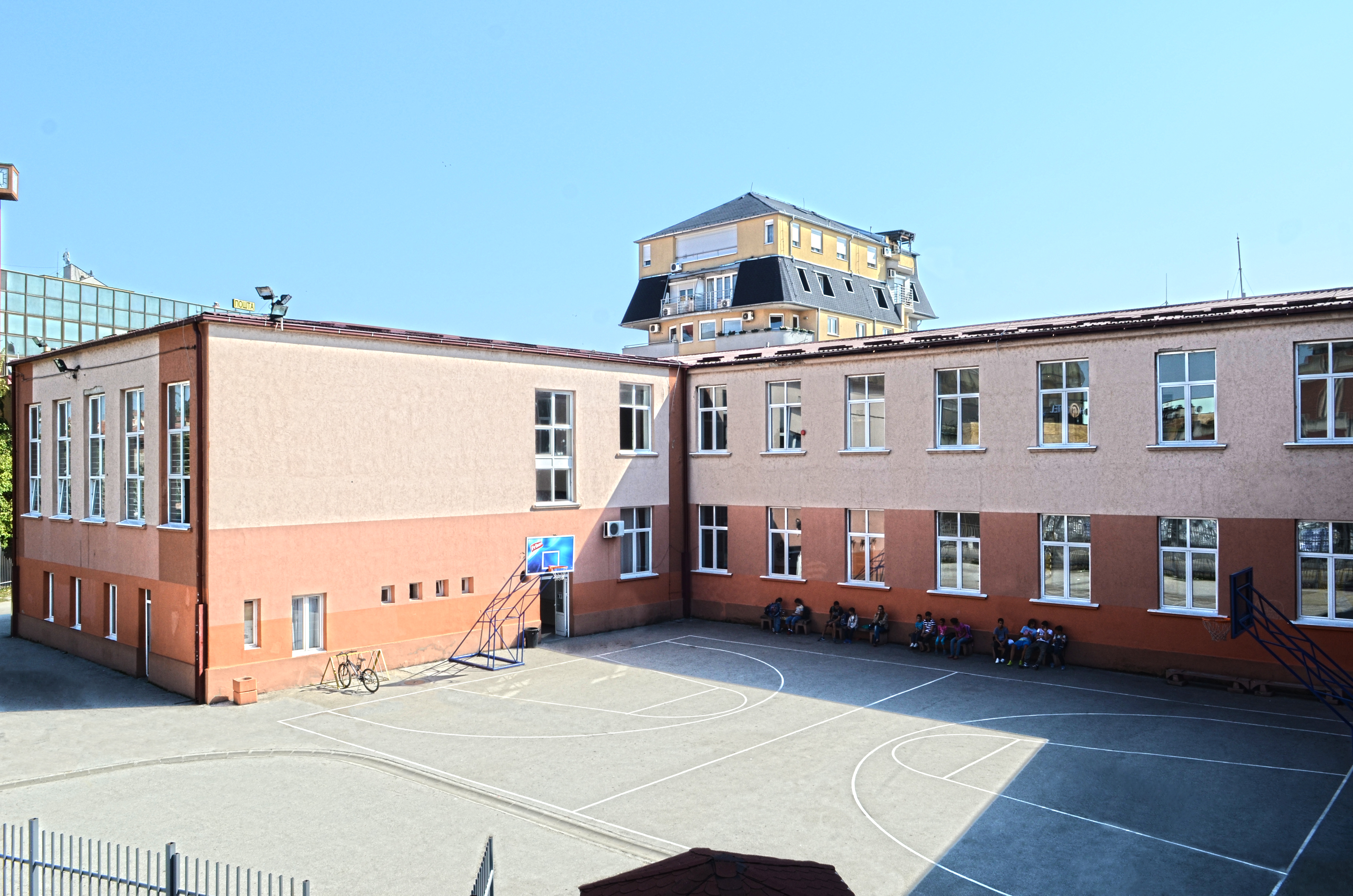 ОШ „17. октобар“ у Јагодини